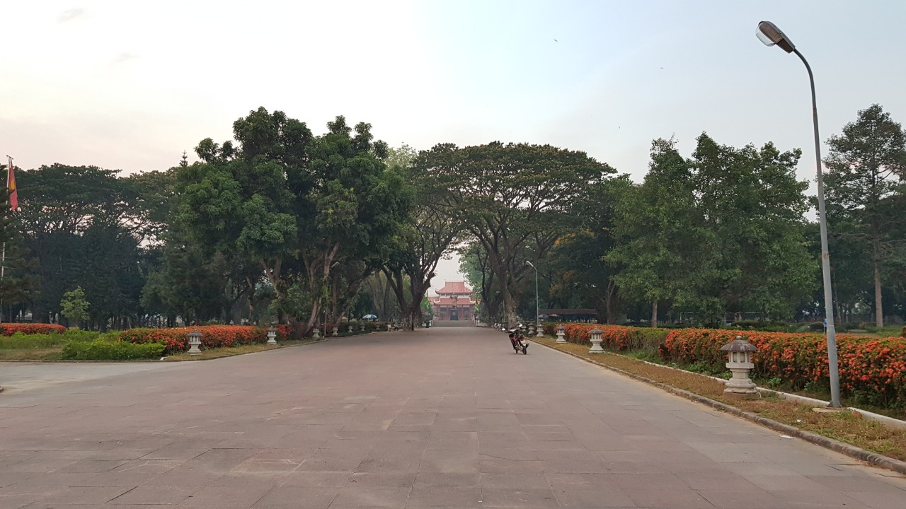 Quang Trung meseum - Tay Son - Binh Dinh - Vietnam